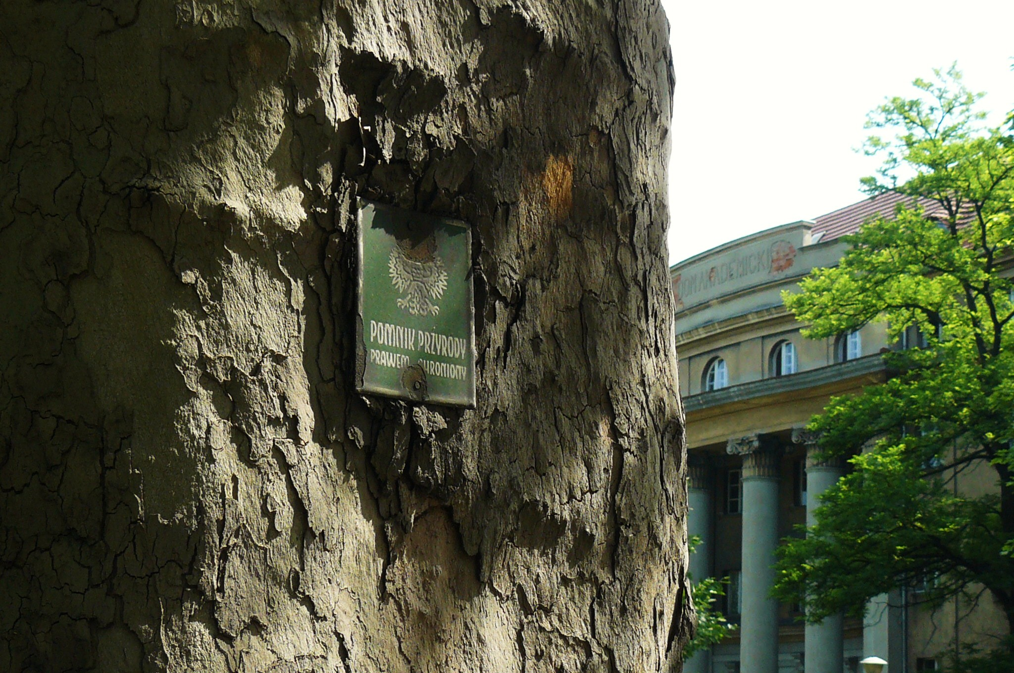 Poznań, Aleje Niepodległości.